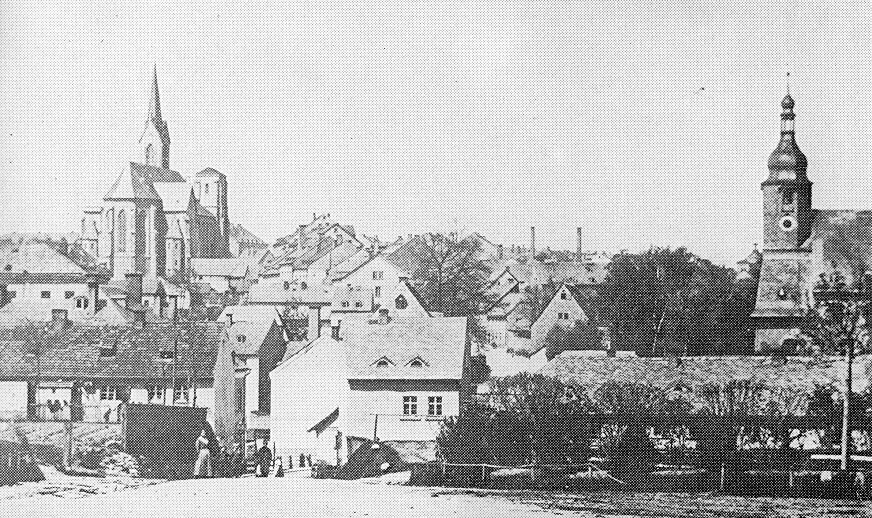 Marienkirche mit fertigem Westturm, Bau der Kirche war von 1864 bis 1878